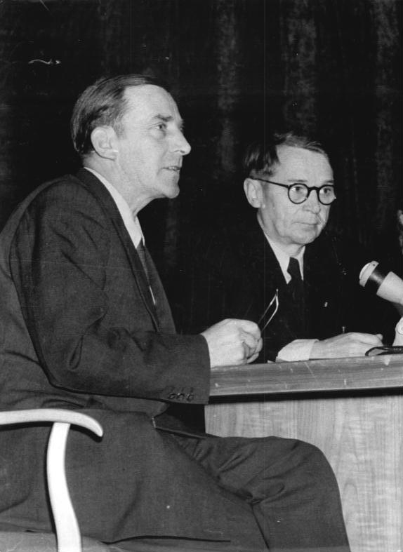 Zentralbild Quaschinsky 4.10.1954 Matinee in der Volksbühne - Deutsche Dichter sprechen Eine Programmfolge durch das Schaffen zeitgenössischer Schriftsteller und Dichter brachte eine Matinee des Schriftstellerverband der DDR am Sonntag, dem 3. Oktober 1954 in der Volksbühne Berlin. UBz: Bodo Uhse, Schriftsteller und Theo Harych, Heinrich Mann-Preisträger während der Matinee.